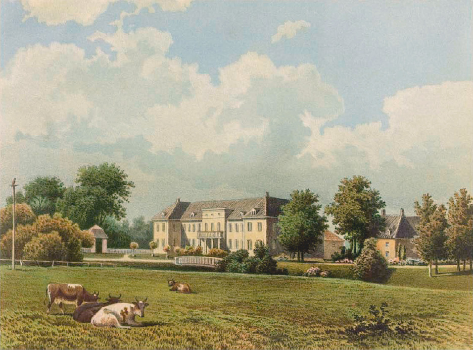 Litografie des Schlosses Gnadenthal in Kleve-Donsbrüggen